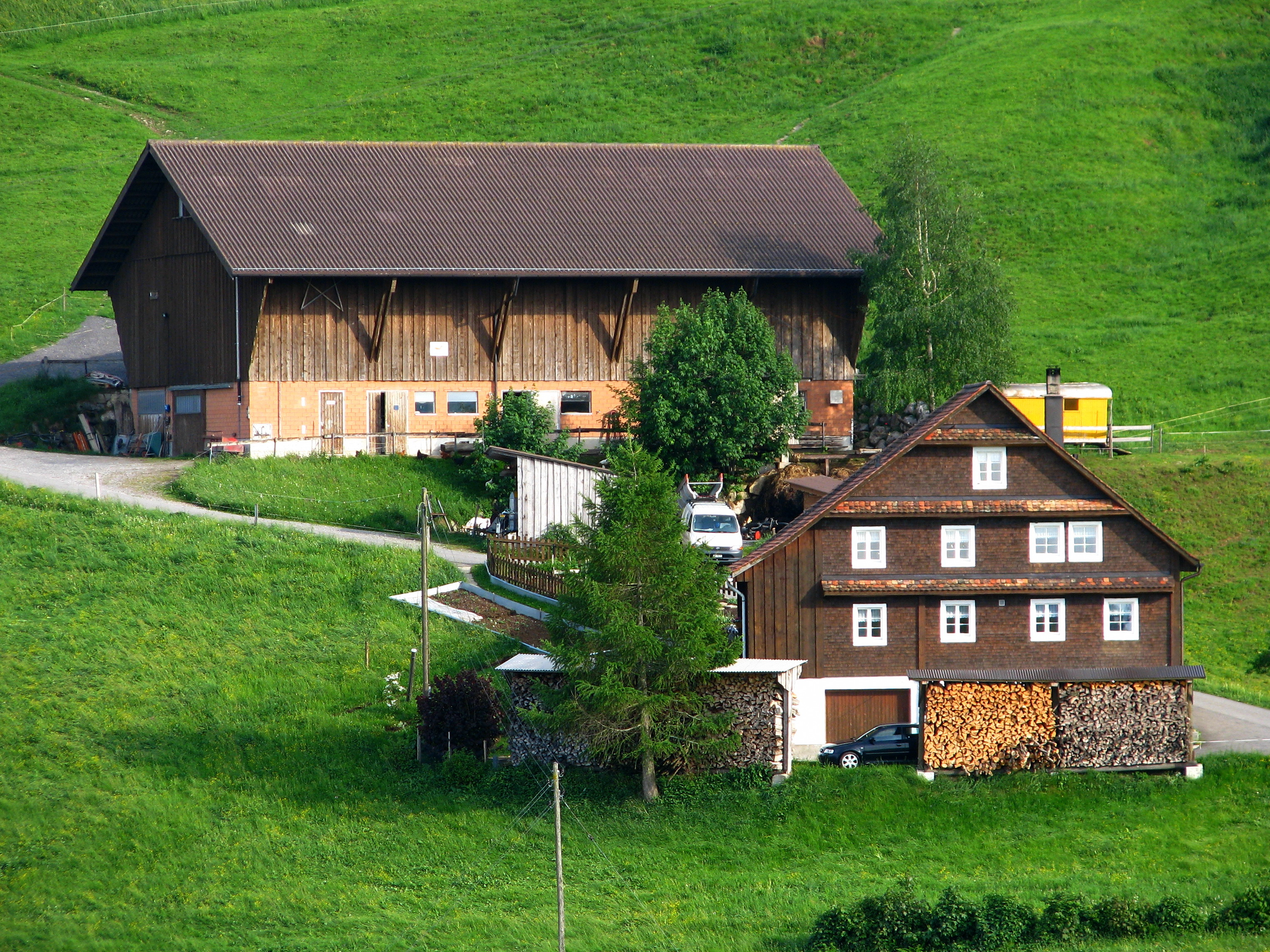 Einsiedeln (SZ) in Switzerland